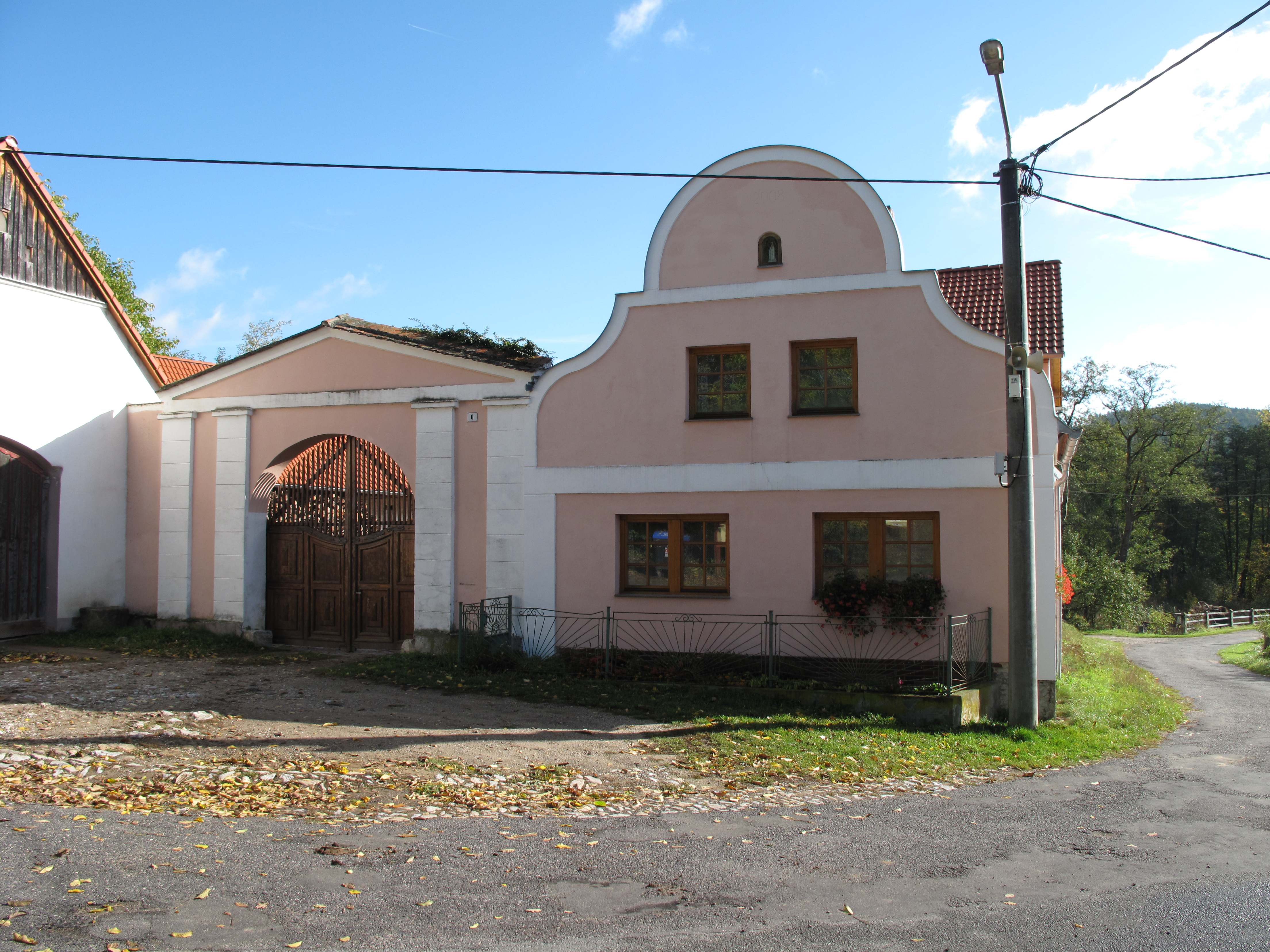 Stavení čp. 6 ve vsi Malé Hydčice. Okres Klatovy, Česká republika.